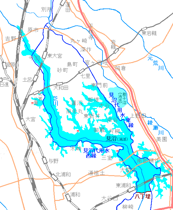 見沼地図（埼玉県）